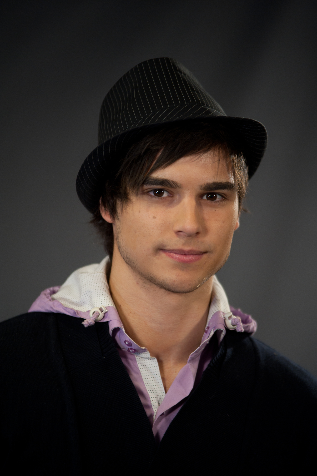 Eric Saade 2010 at a press conference for Melodifestivalen 2011